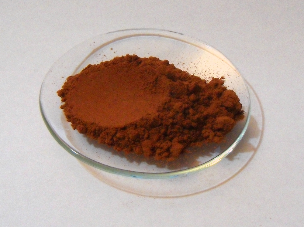 gummi accaroides, braun-rot (Akaroidharz, Red Gum)